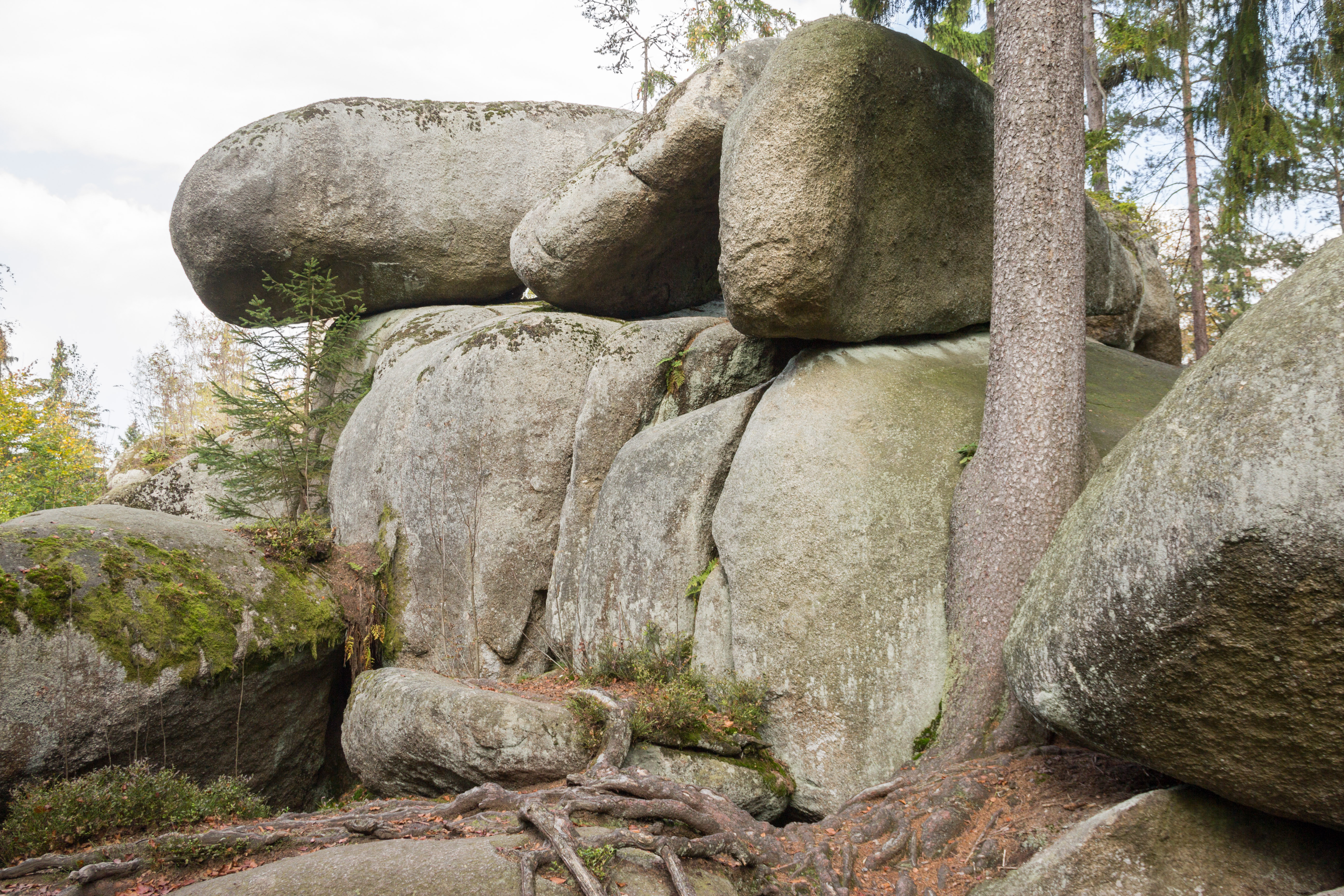 Luisenburg, Naturschutzgebiet, Geotop